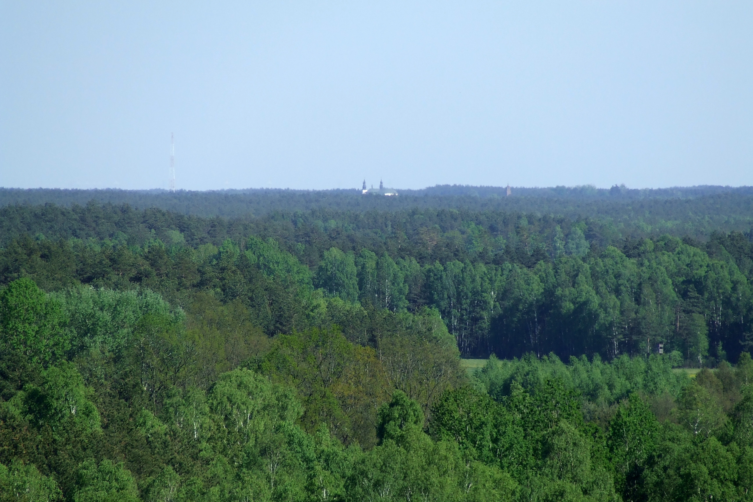 Puszcza Kurpiowska - widok z wieży w Podgórzu w kierunku Kadzidła